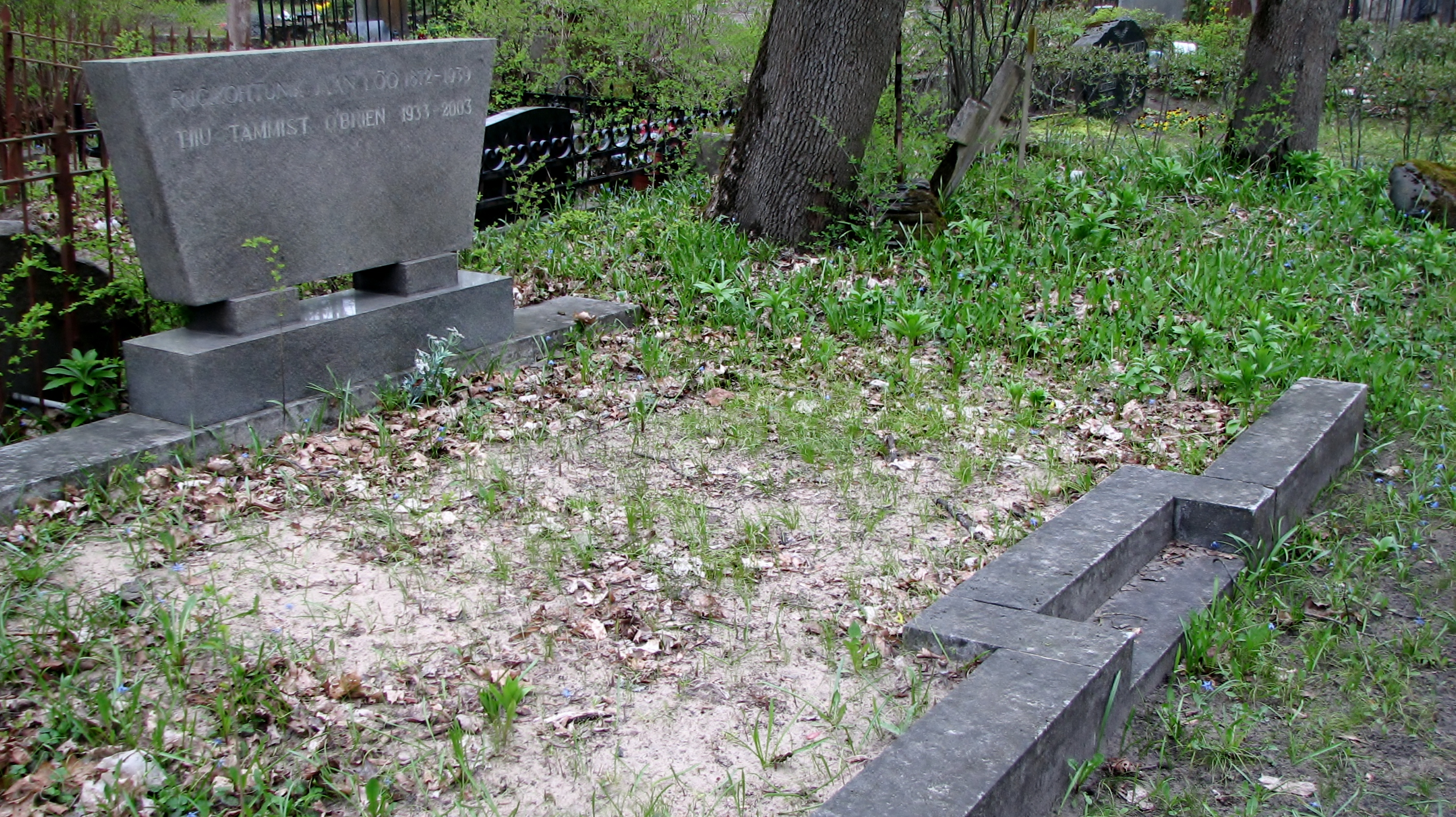 Riigikohtunik Jaan Lõo ja tema tütre Tiiu Tammist O'Brieni haud